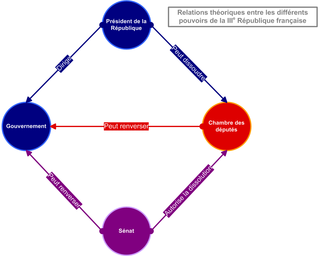 Organigramme simple des relations théoriques entre les différents pouvoirs institutionnels de la Troisième République.